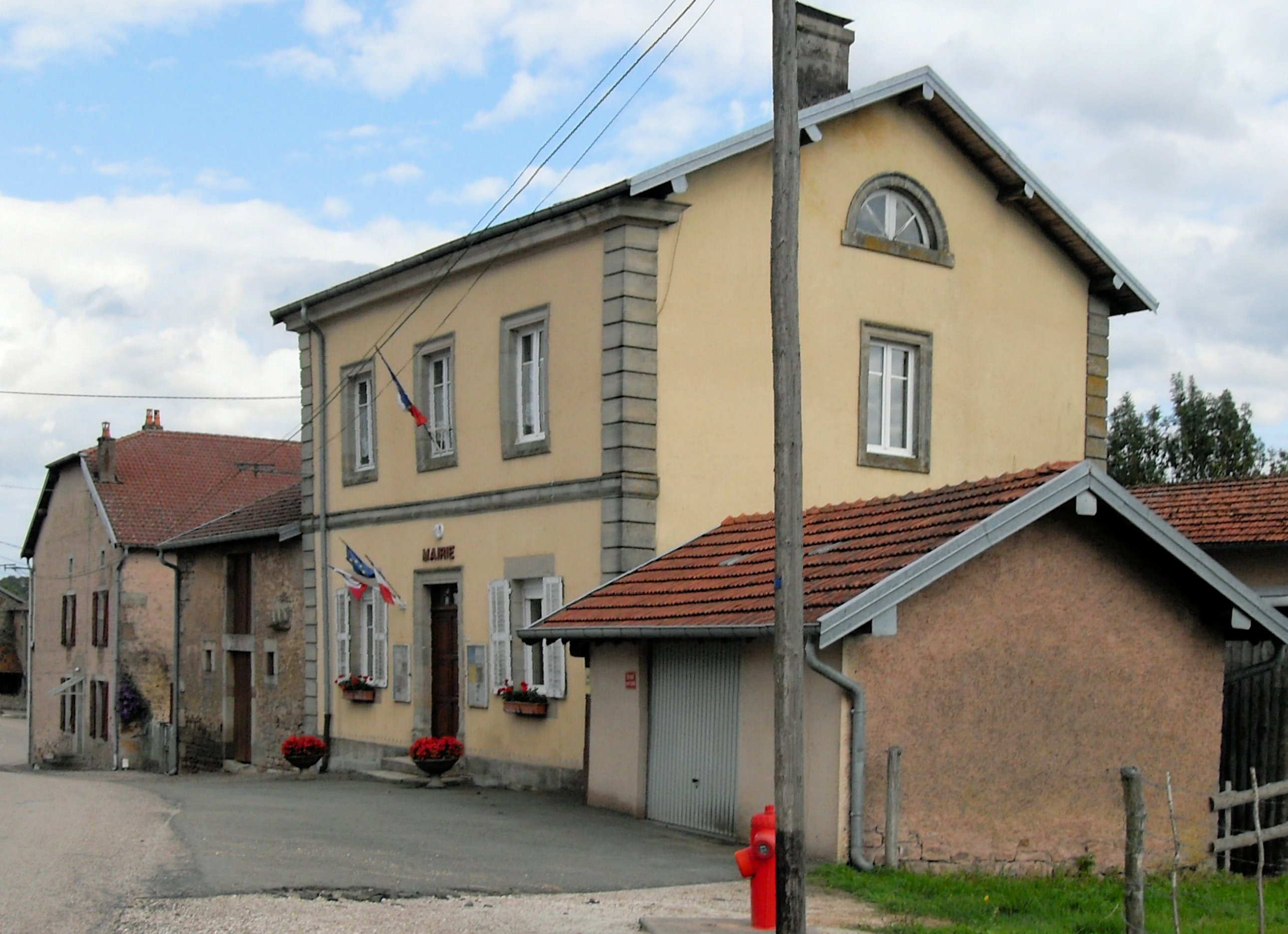 La mairie de Montmotier